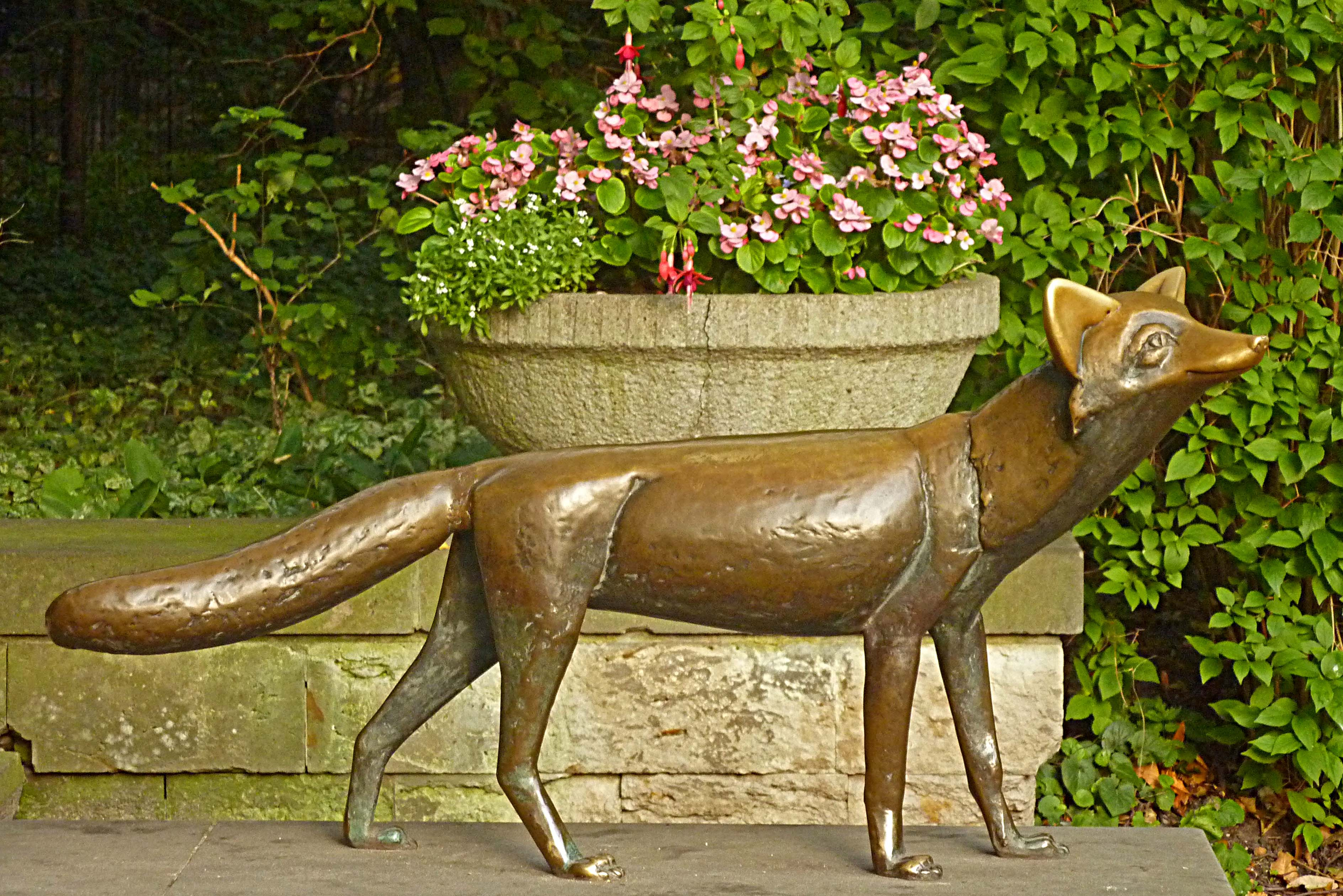 Bronzeplastik 'Junger Fuchs' von Stephan Horota aus dem Jahr 1965 im Tierpark Berlin (Friedrichsfelde), auf einer Treppenwange zwischen Wolfsgehege und Kamelwiese.